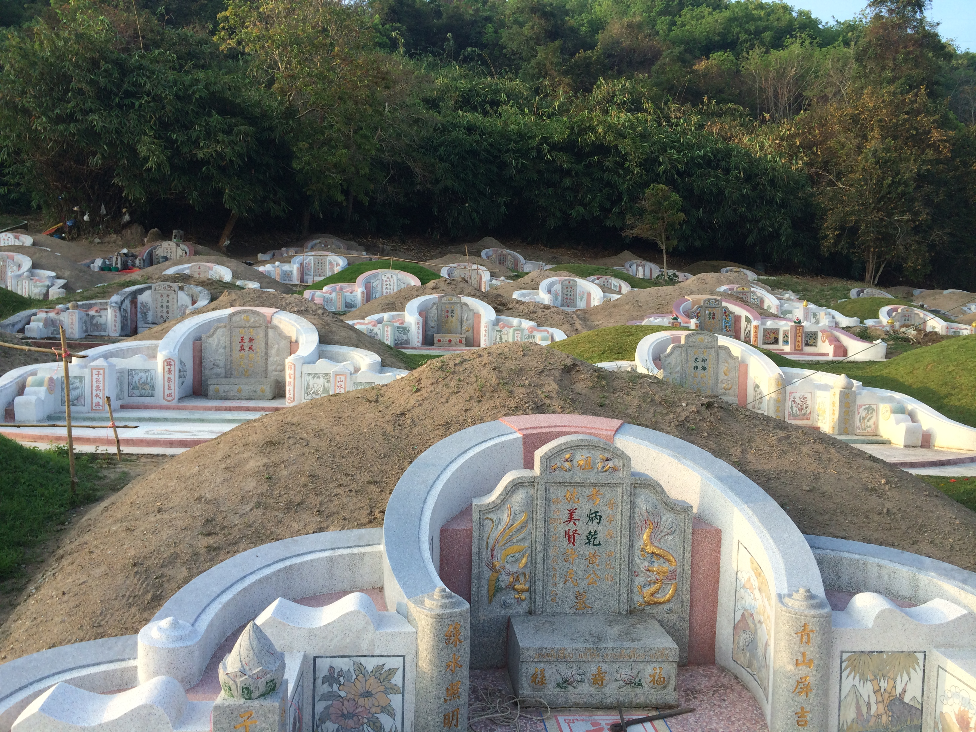 Sateng Nok, Mueang Yala District, Yala, Thailand